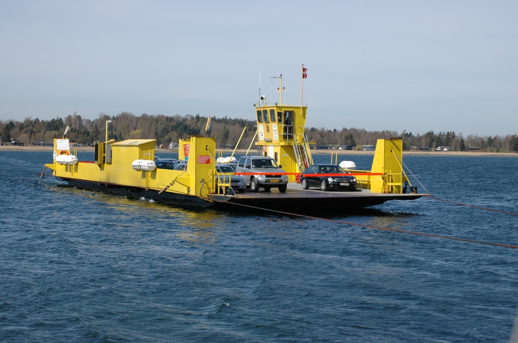 Orø kabelfærge